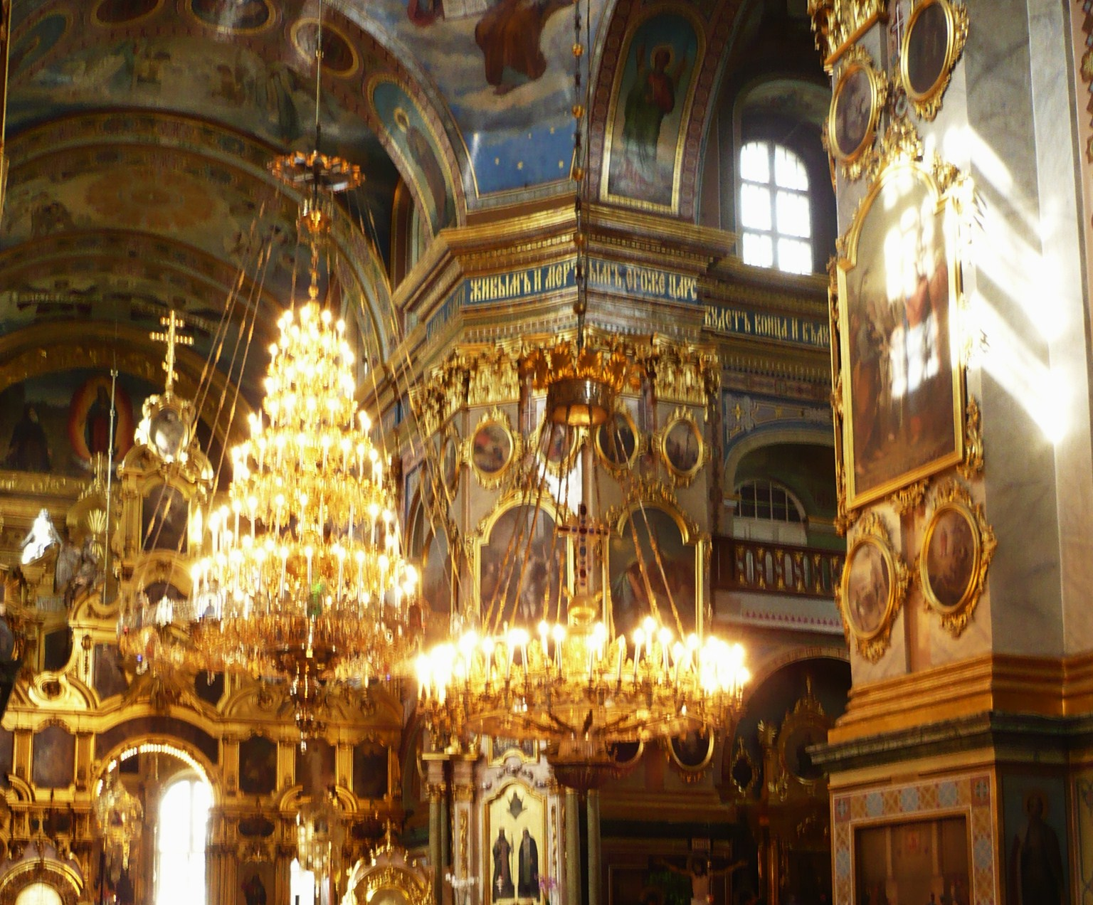 Ławra Poczajowska